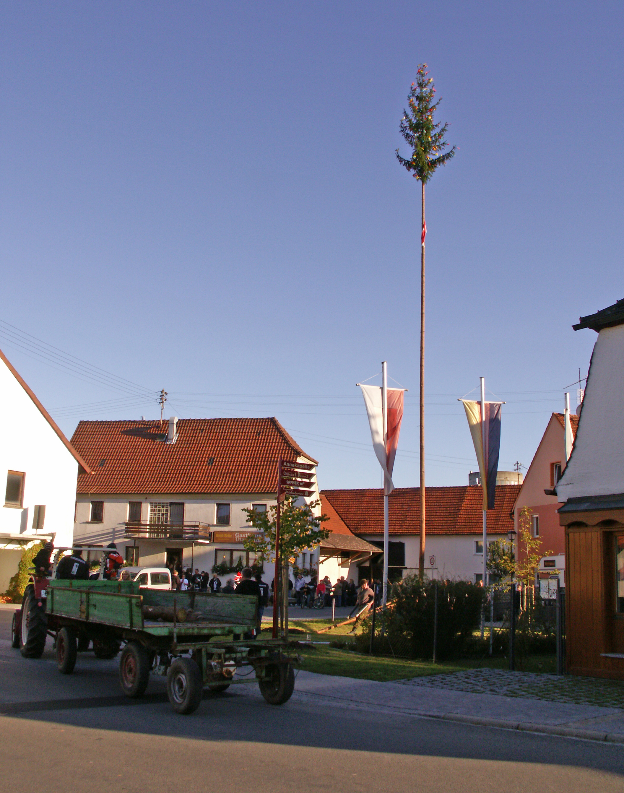 Kirchweihbaum Neuhausen